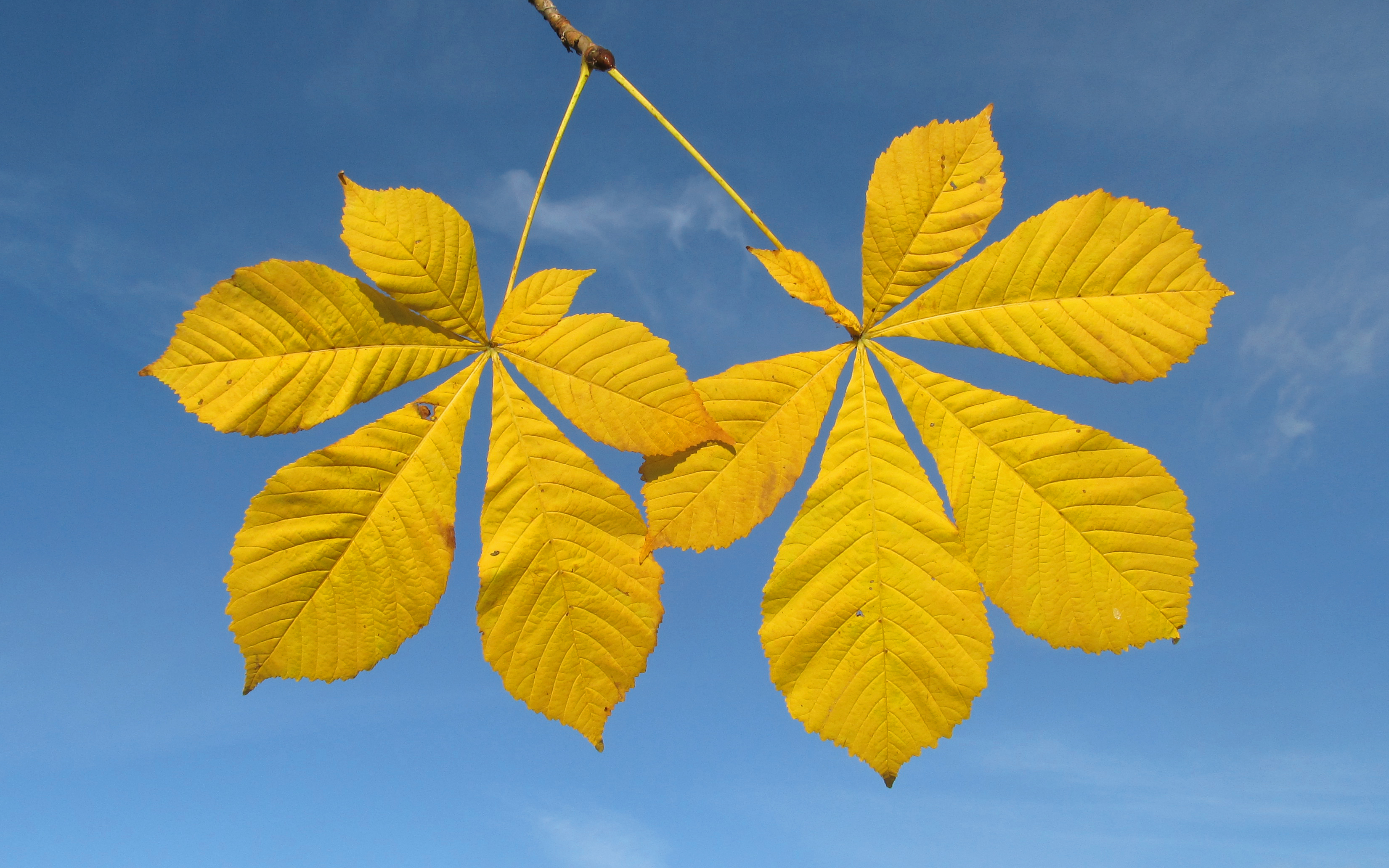 Aesculus hippocastanum Каштан конский Листья осенние